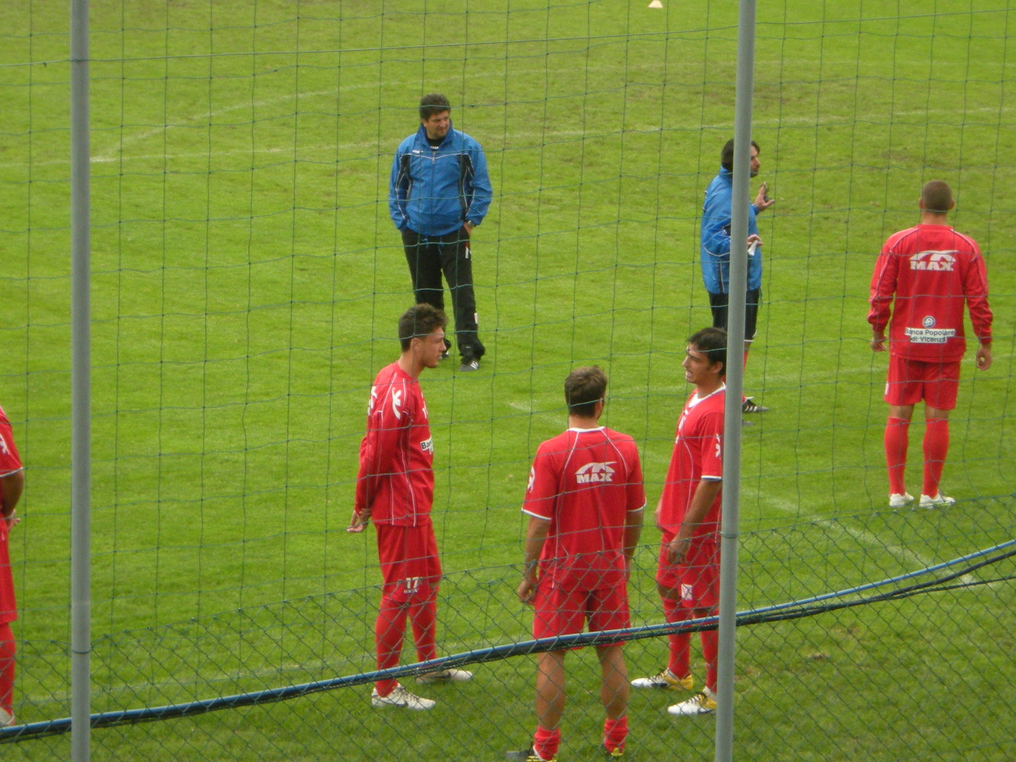 Ritiro pre-campionato del Vicenza Calcio a Gallio (stagione 2011/2012)